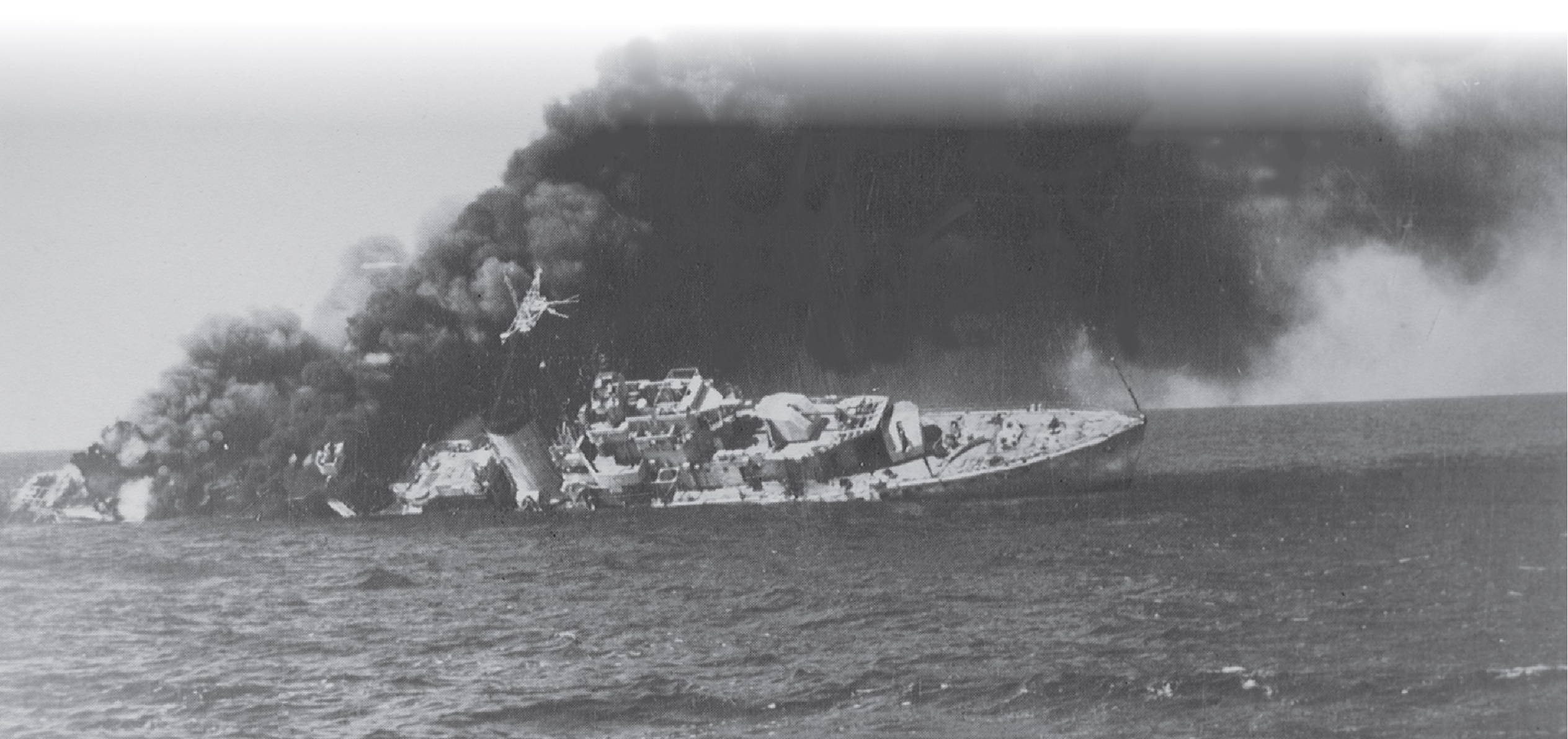 המשחתת ק-42 מסיימת את שירותה כמטרה לירי טילי גבריאל